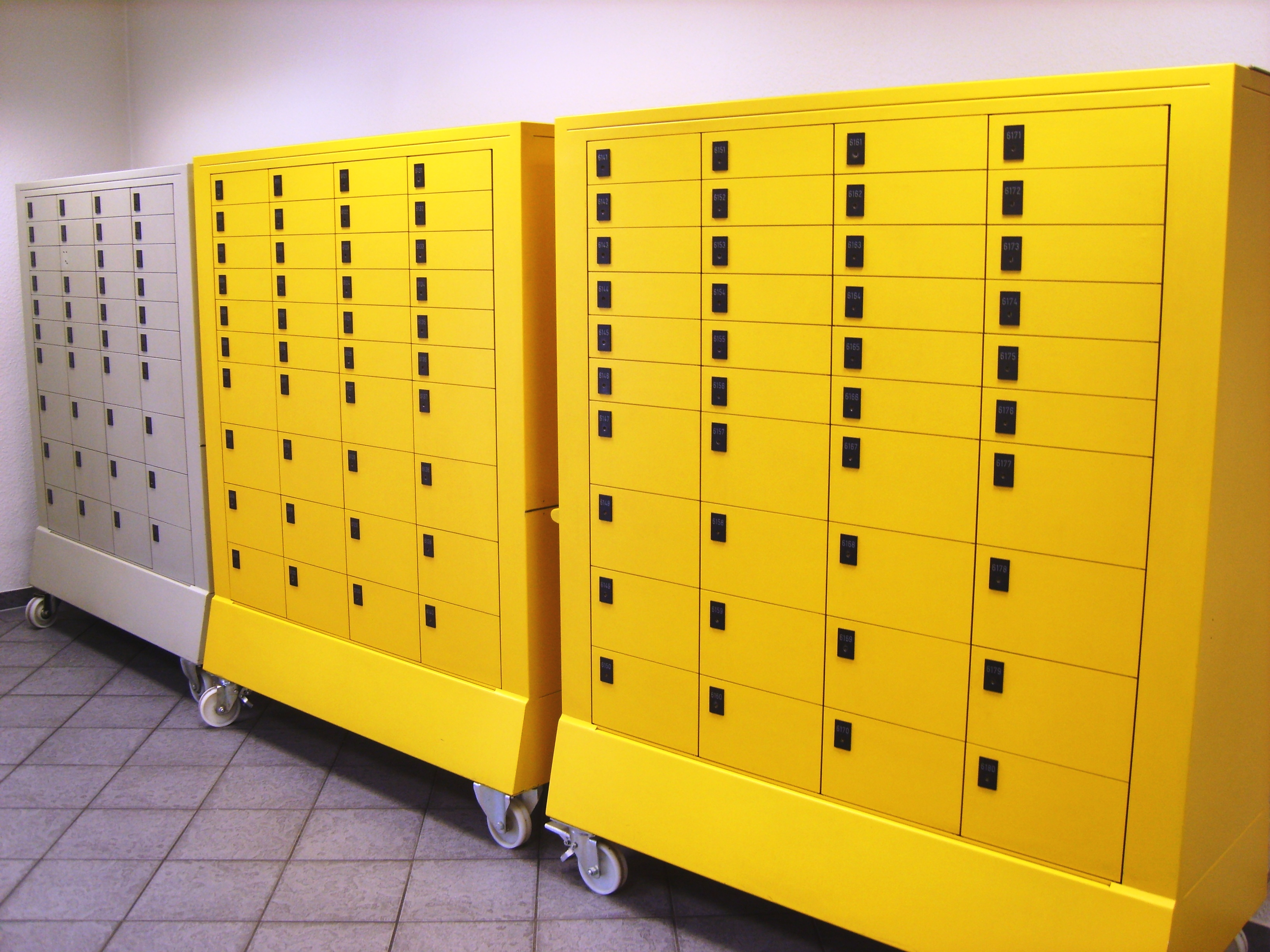 fahrbare Postfachschränke in Dürwiß: die gelben Schränke beinhalten die Fächer 6101 bis 6180 und tragen gemeinsam die Postleitzahl 52238; der graue Schrank beinhaltet die Fächer 6201 bis 6240 und trägt die Postleitzahl 52239